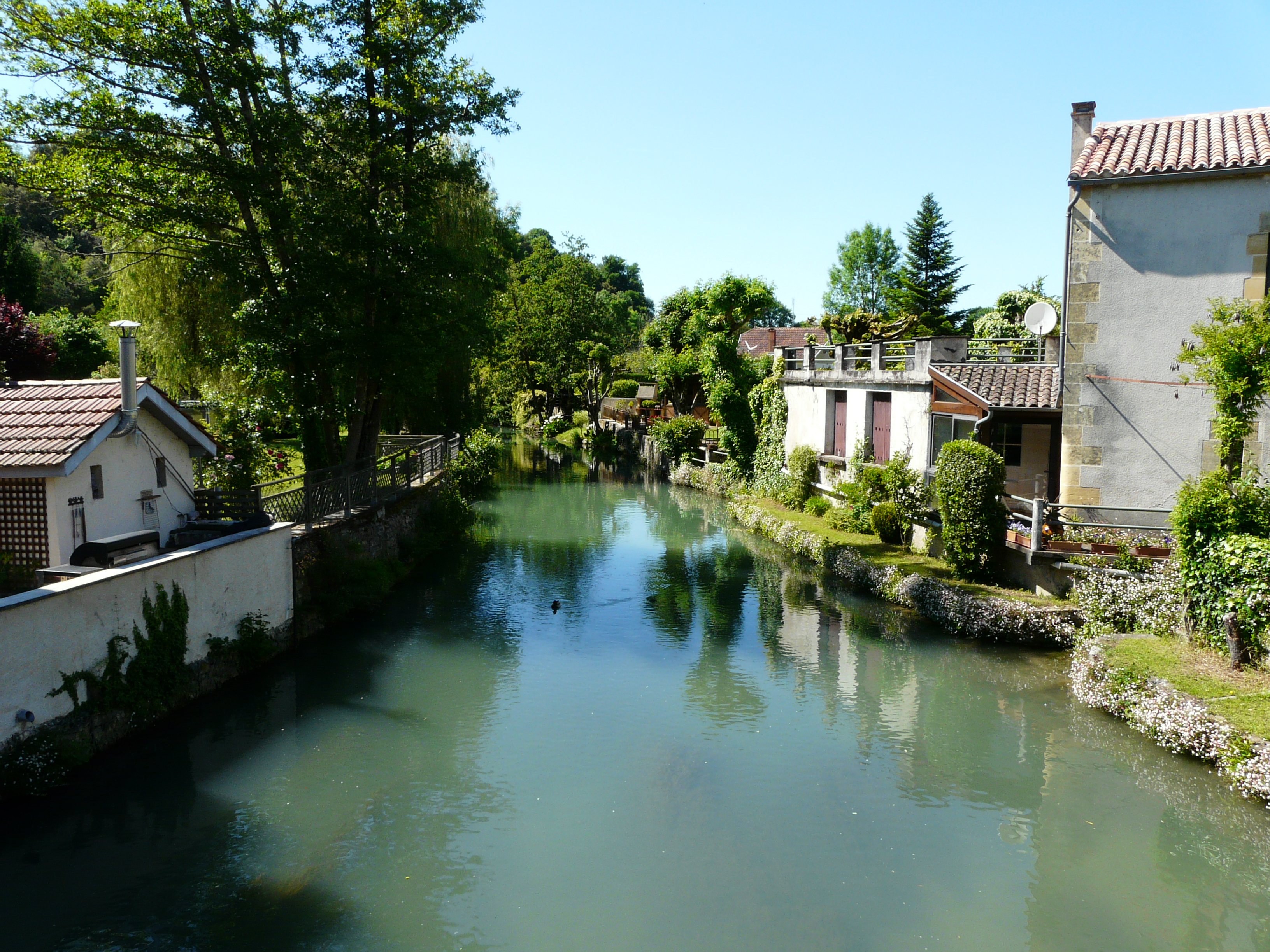 La Couze en aval du pont de la route départementale 37, Couze-et-Saint-Front, Dordogne, France.